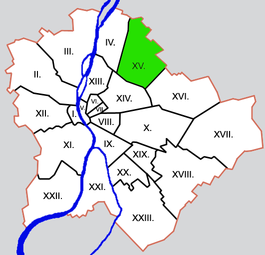 Budapest kerületei: XV. kerület